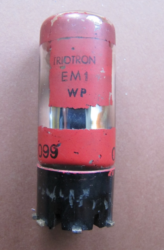 Lampa EM1 Triotron